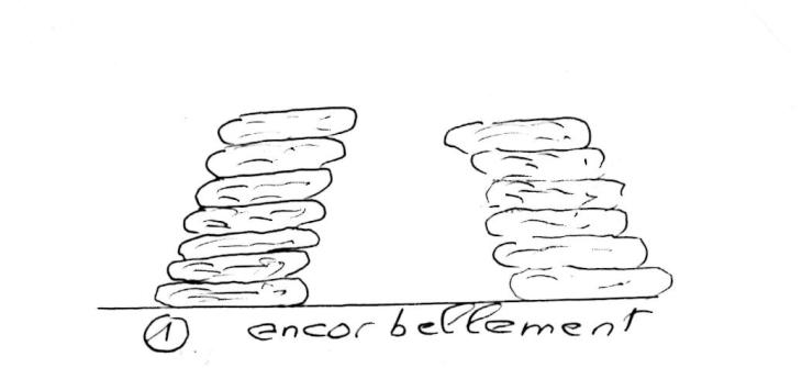 construction d'une borie en encorbellement dessin personnel - 2005